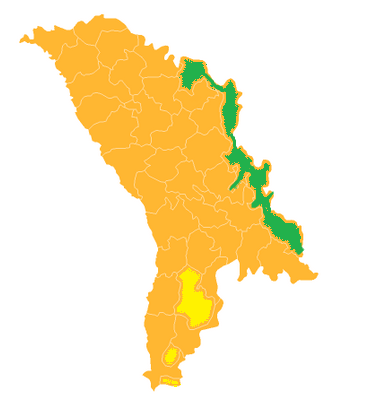 Transznisztria (zöld színnel jelölve) és Gagauzia (sárga színnel jelölve) elhelyezkedése a Moldovai Köztársaságon belül.